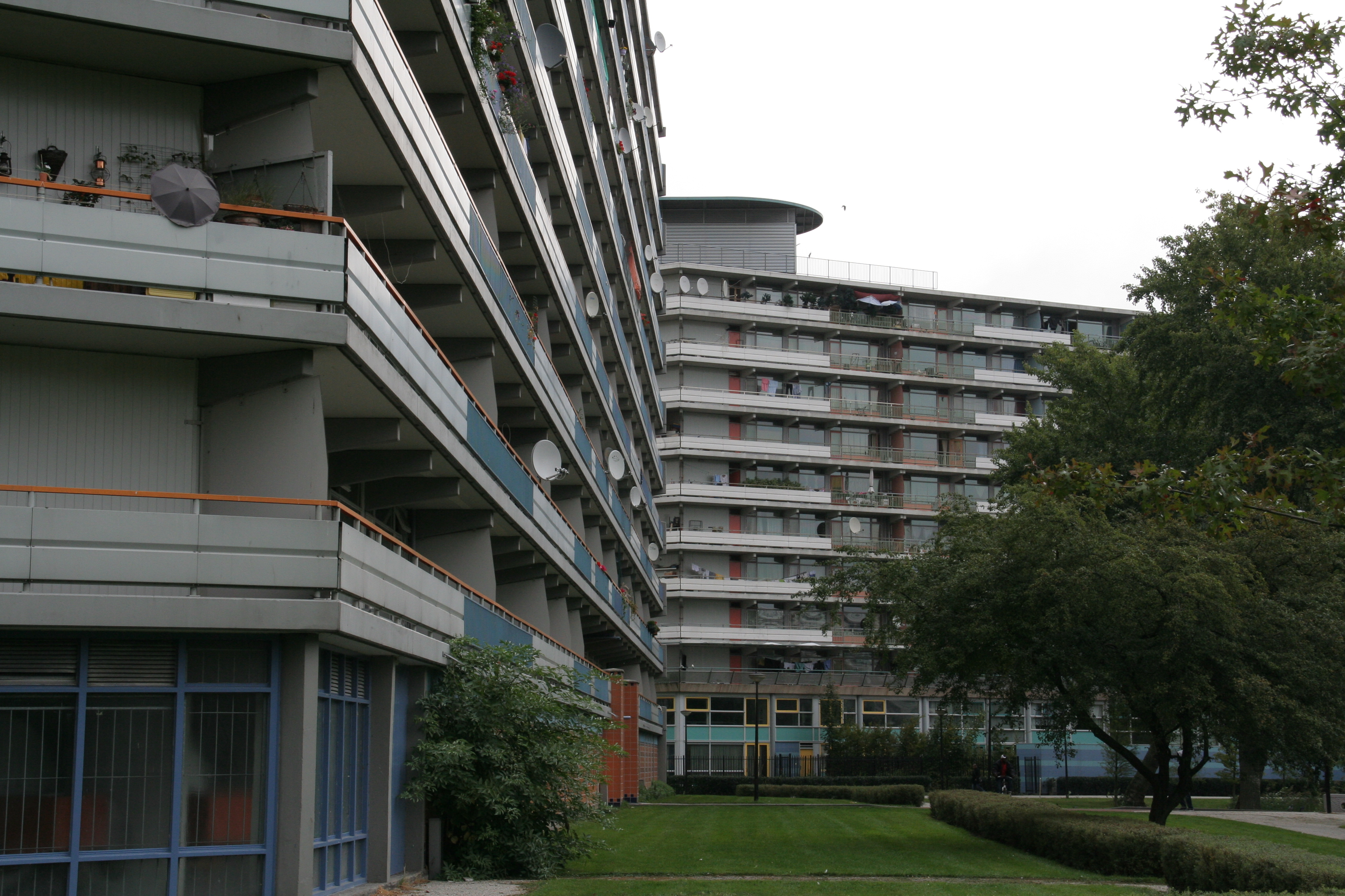 Bijlmermeer, flat Groeneveen